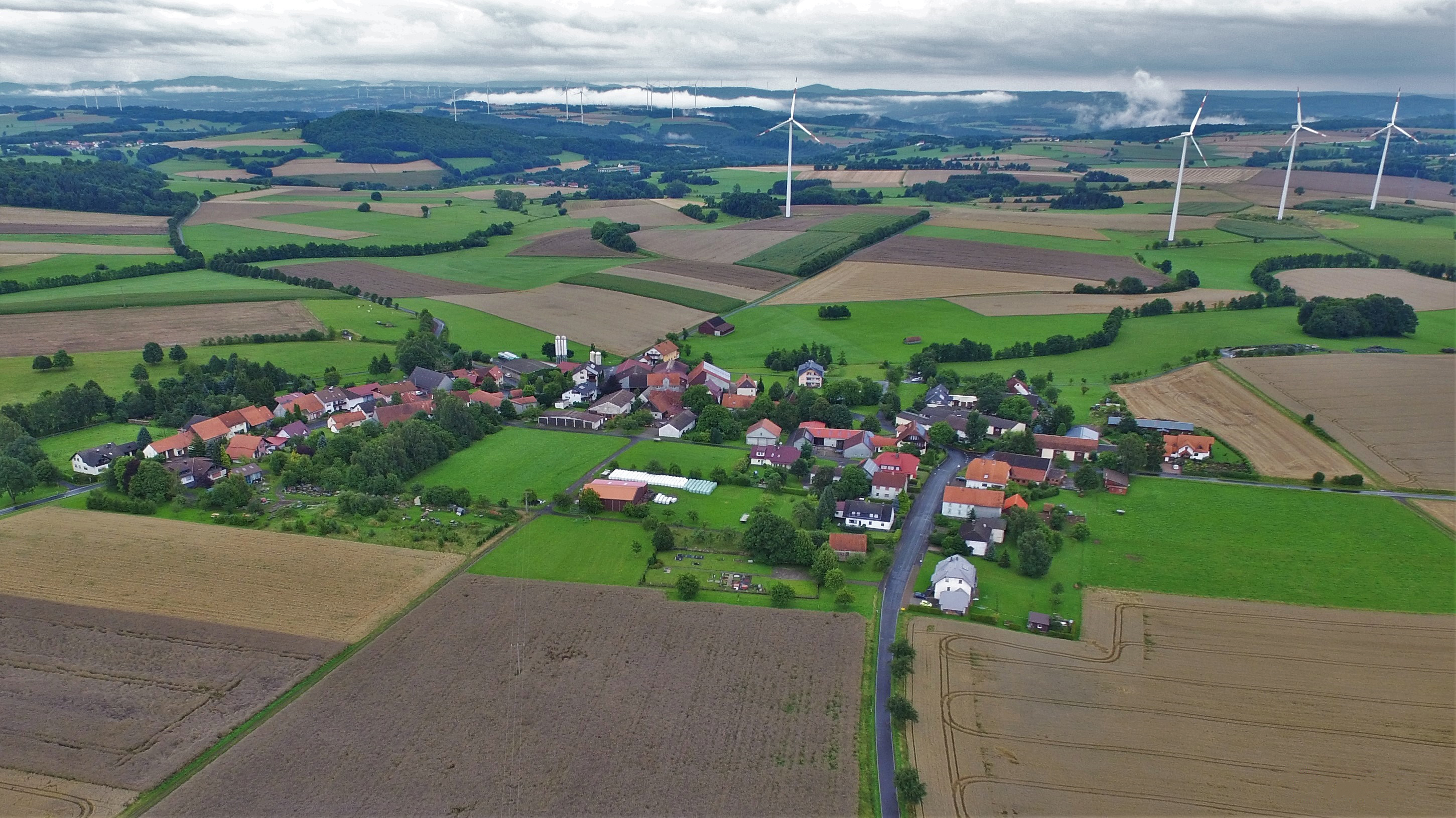 Fleschenbach Luftaufnahme